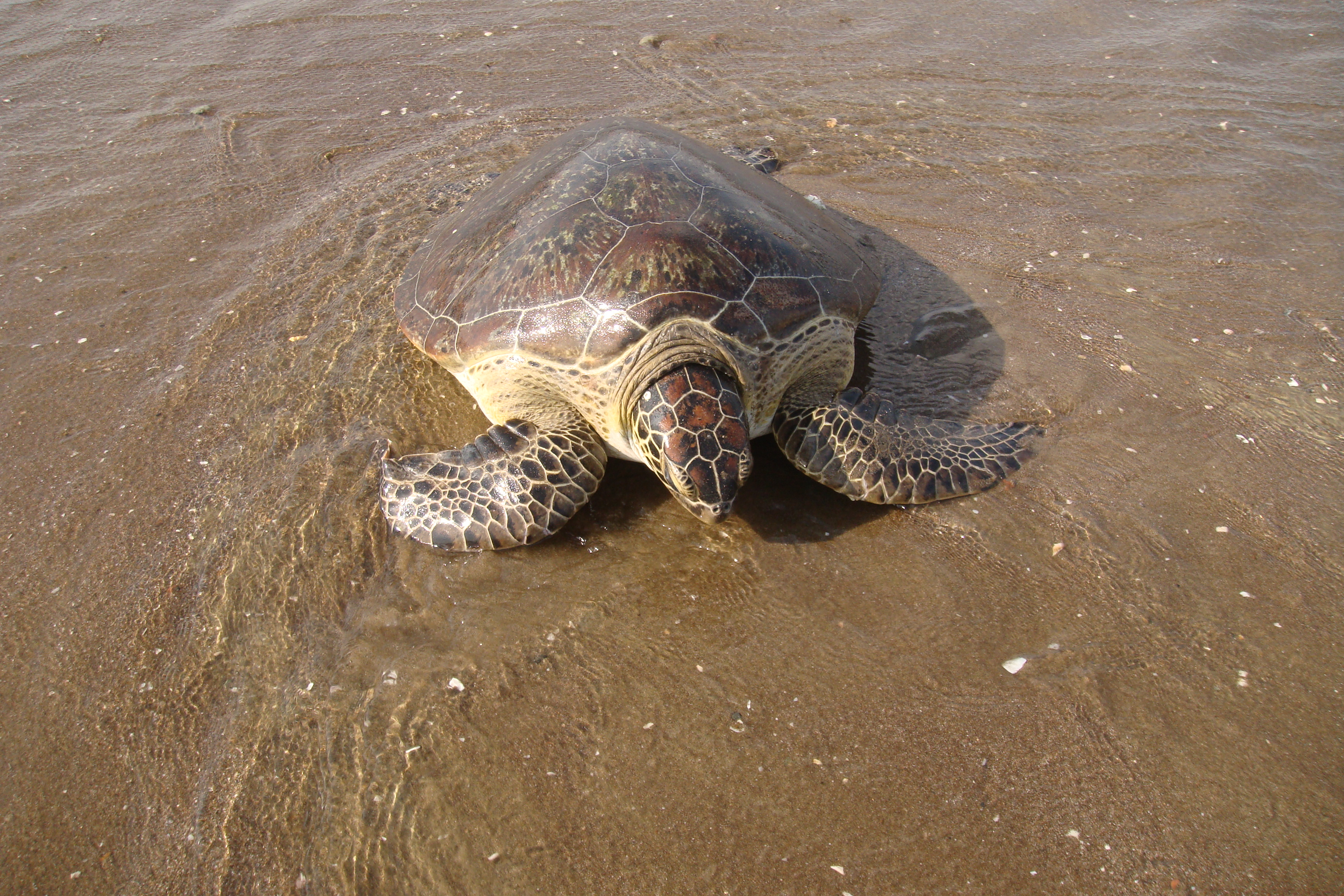 Turtle